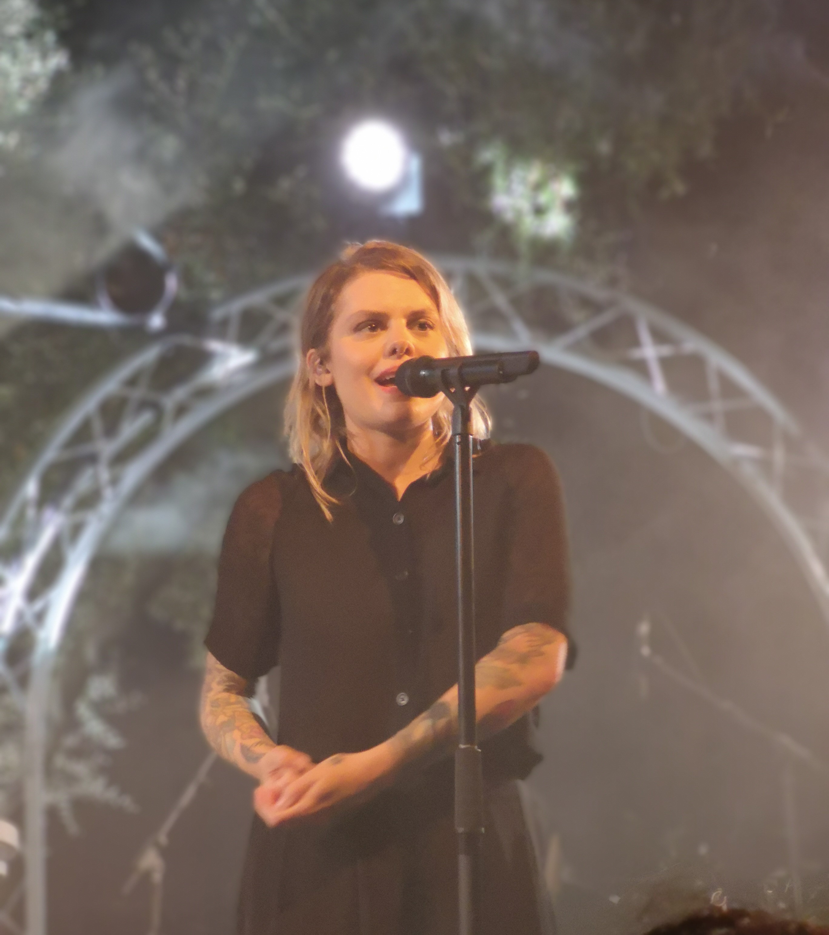 Cœur de Pirate au Mas des Escaravatiers, le 24 juillet 2019.